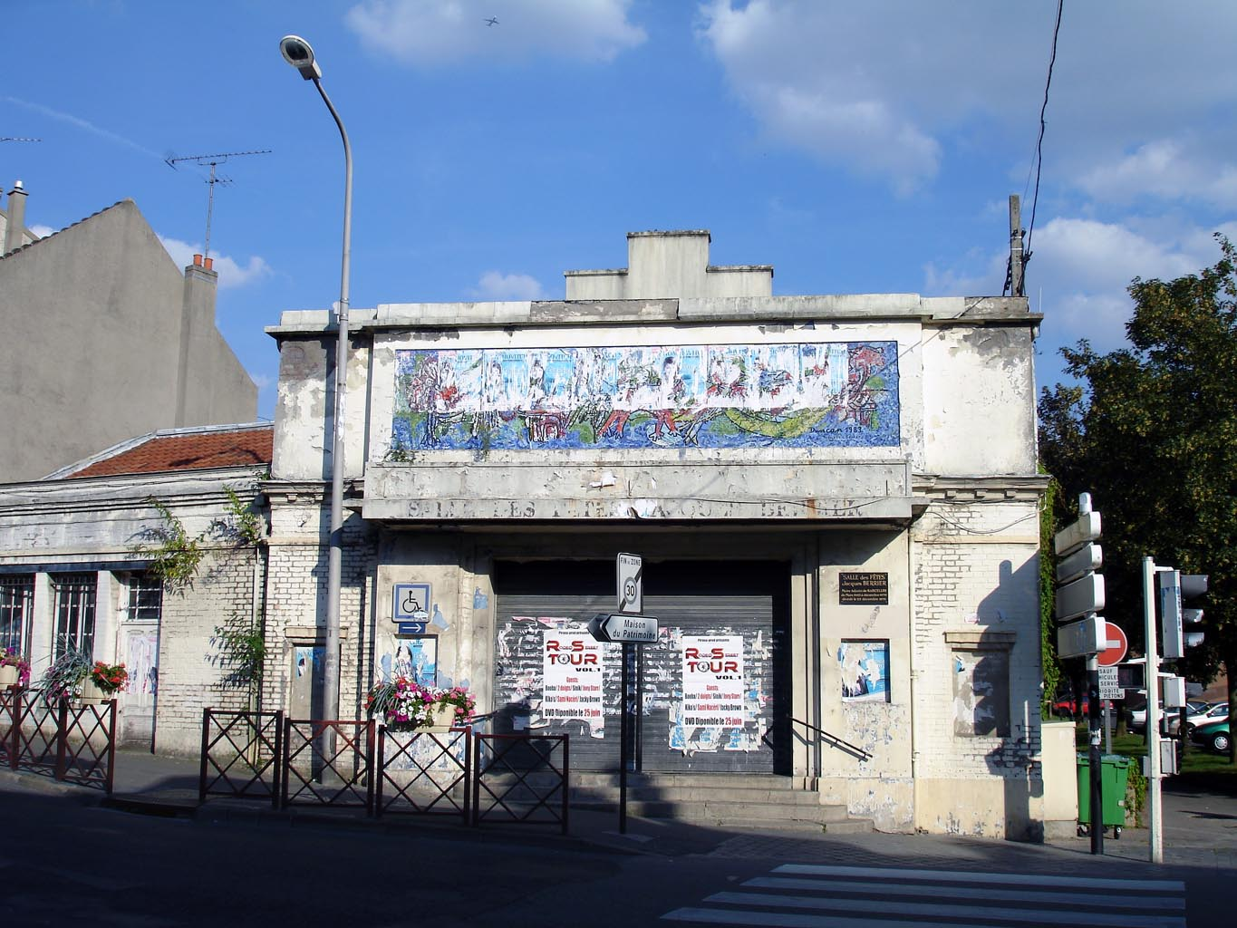 La salle des Fêtes Jacques-Berrier (Rue Pierre-Brossolette) à Sarcelles-Village (Val-d'Oise), France